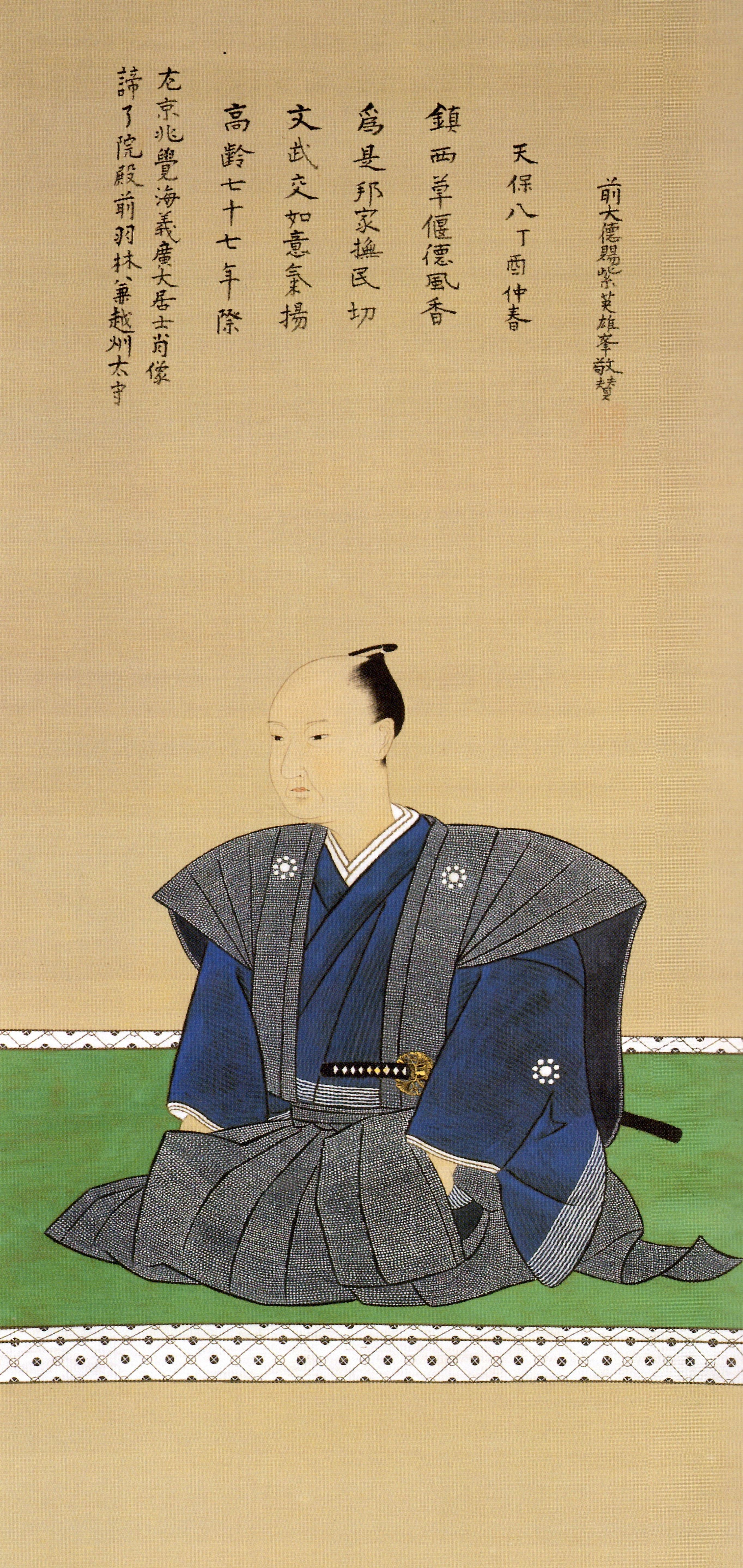 細川斉玆の肖像。